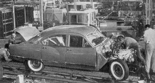 Es una foto del ensamblaje del motor de un Kaiser Carabela.